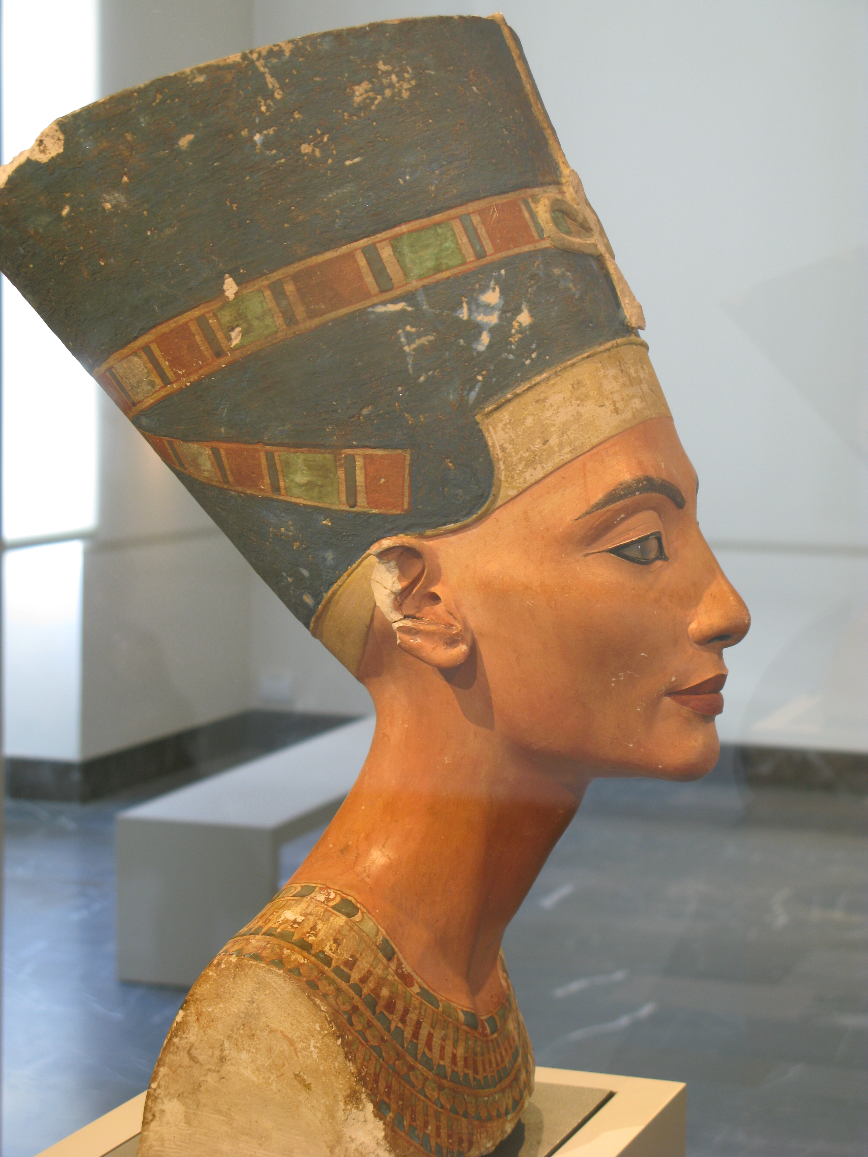 Nefertiti, Altes Museum